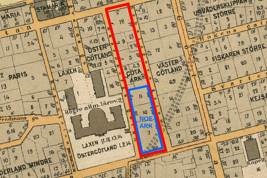 Del av karta över Södermalm visande kvarteret Göta ark år 1909, sedan 1989 namnändrat till kvarteret Noe ark och Skaraborg.